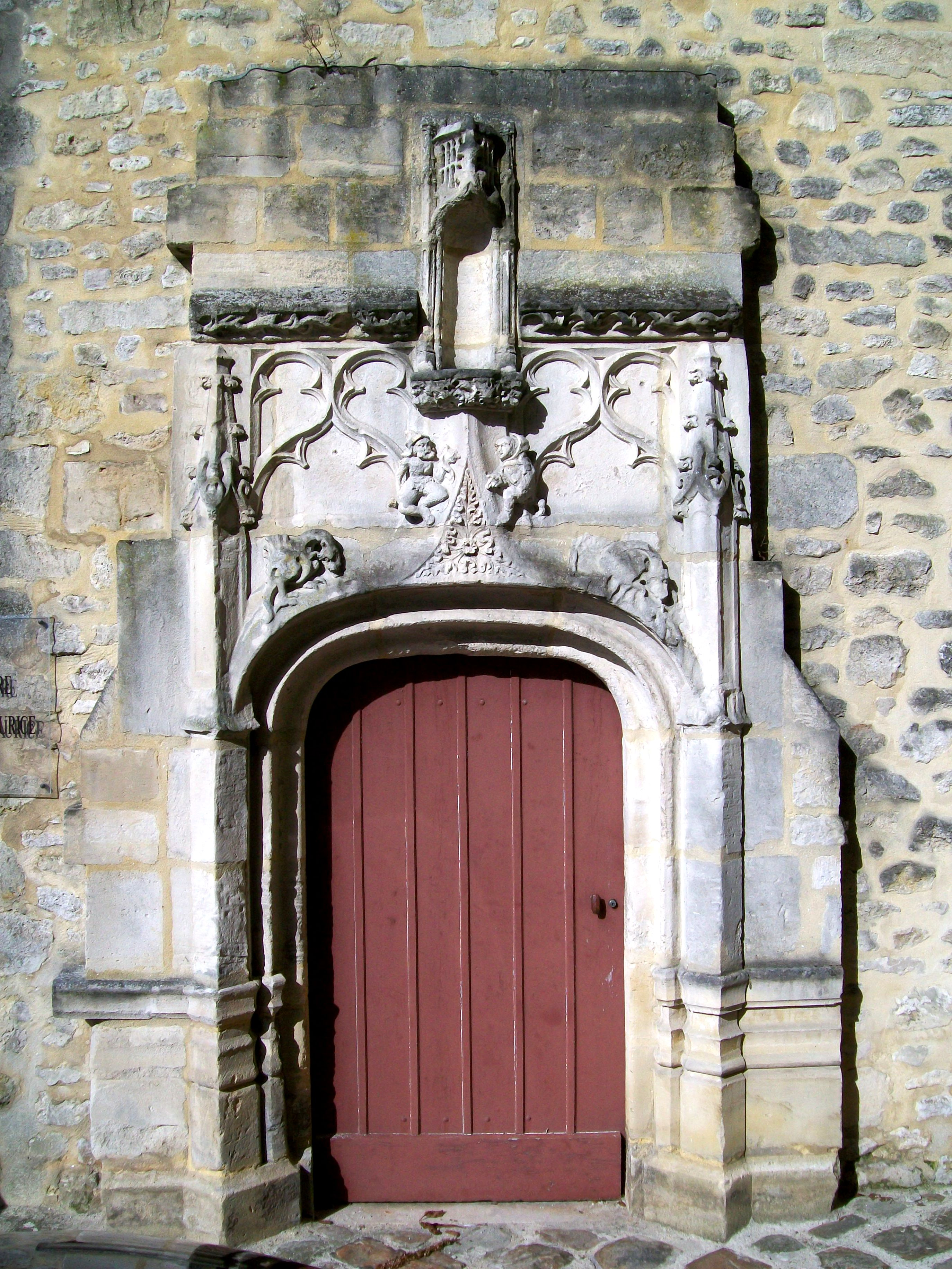 Prieuré St-Maurice, porte provenant du couvent des Cordeliers disparu, remontée ici en 1993.